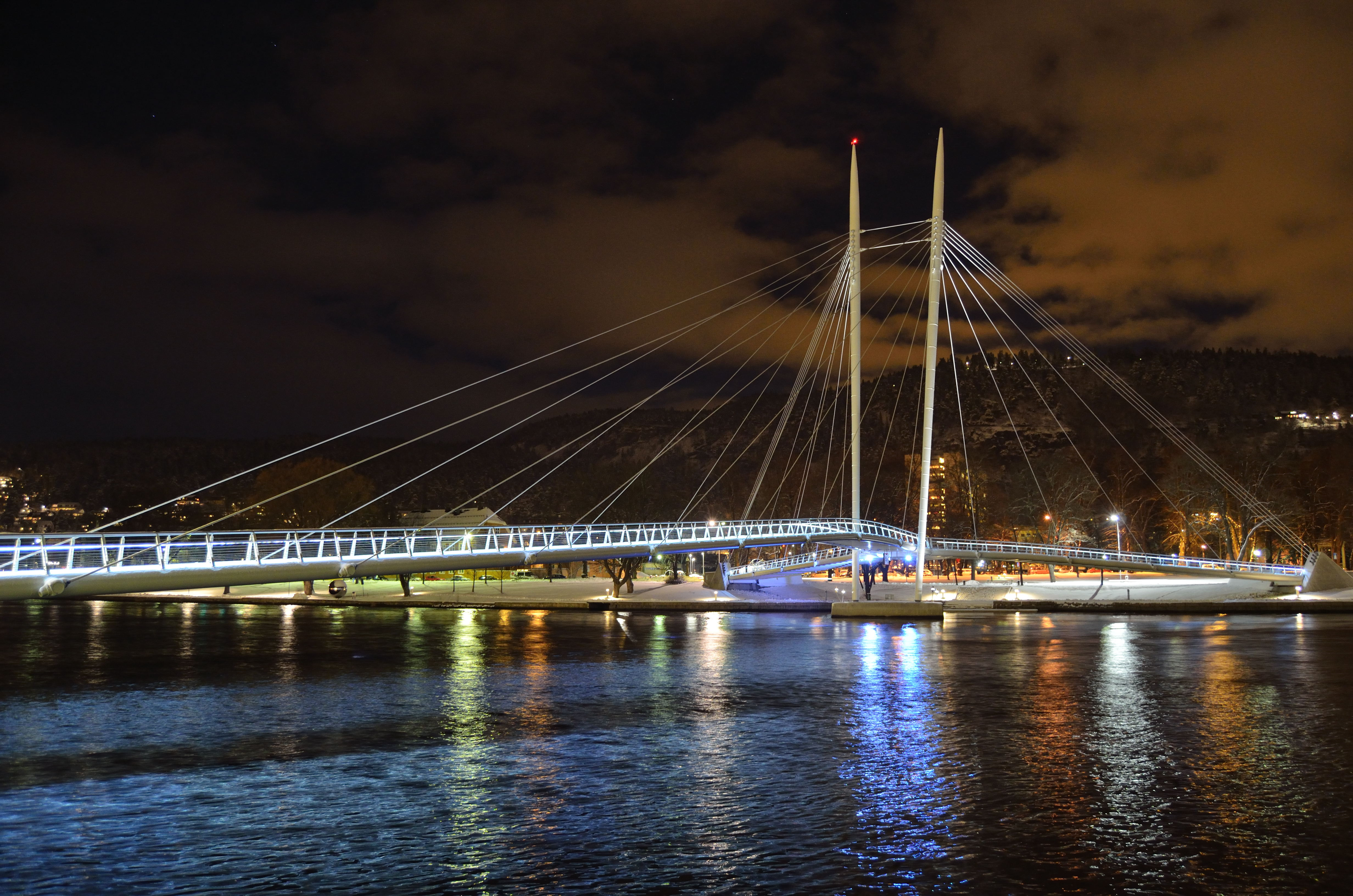 Ypsilon bru by night Unknown